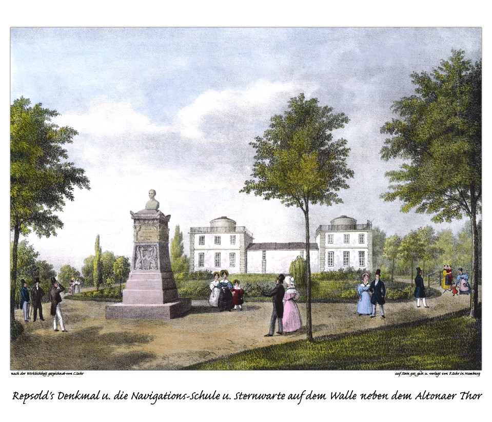 Repsolds Denkmal, Navigations-Schule und Sternwarte auf dem Walle neben dem Altonaer Thor, gezeichnet von Christoffer Suhr, Litho von Peter Suhr